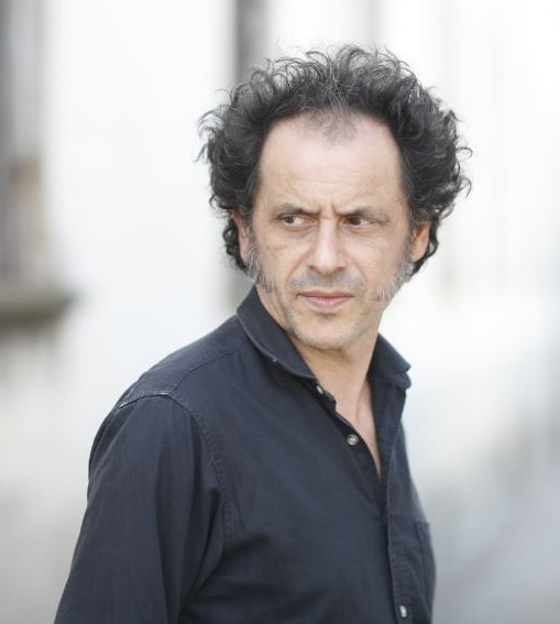 Foto del Canta Autor Pascal Comelade para pagina en catalán